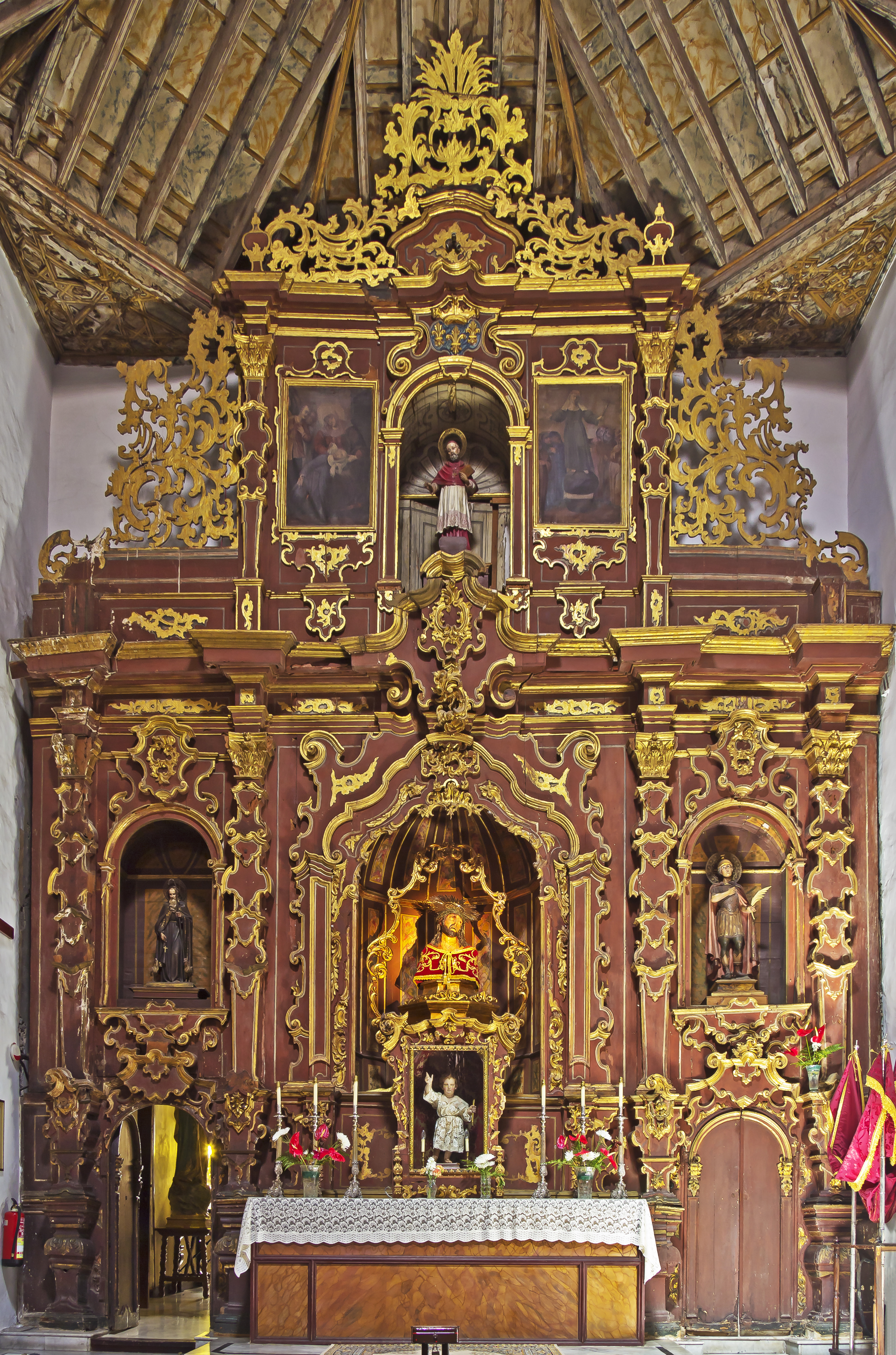 Altar im rechten Seitenschiff der Kirche San Francisco in Santa Cruz de Tenerife; im Zentrum des Altars befindet sich die Plastik des Cristo de las Tribulaciones